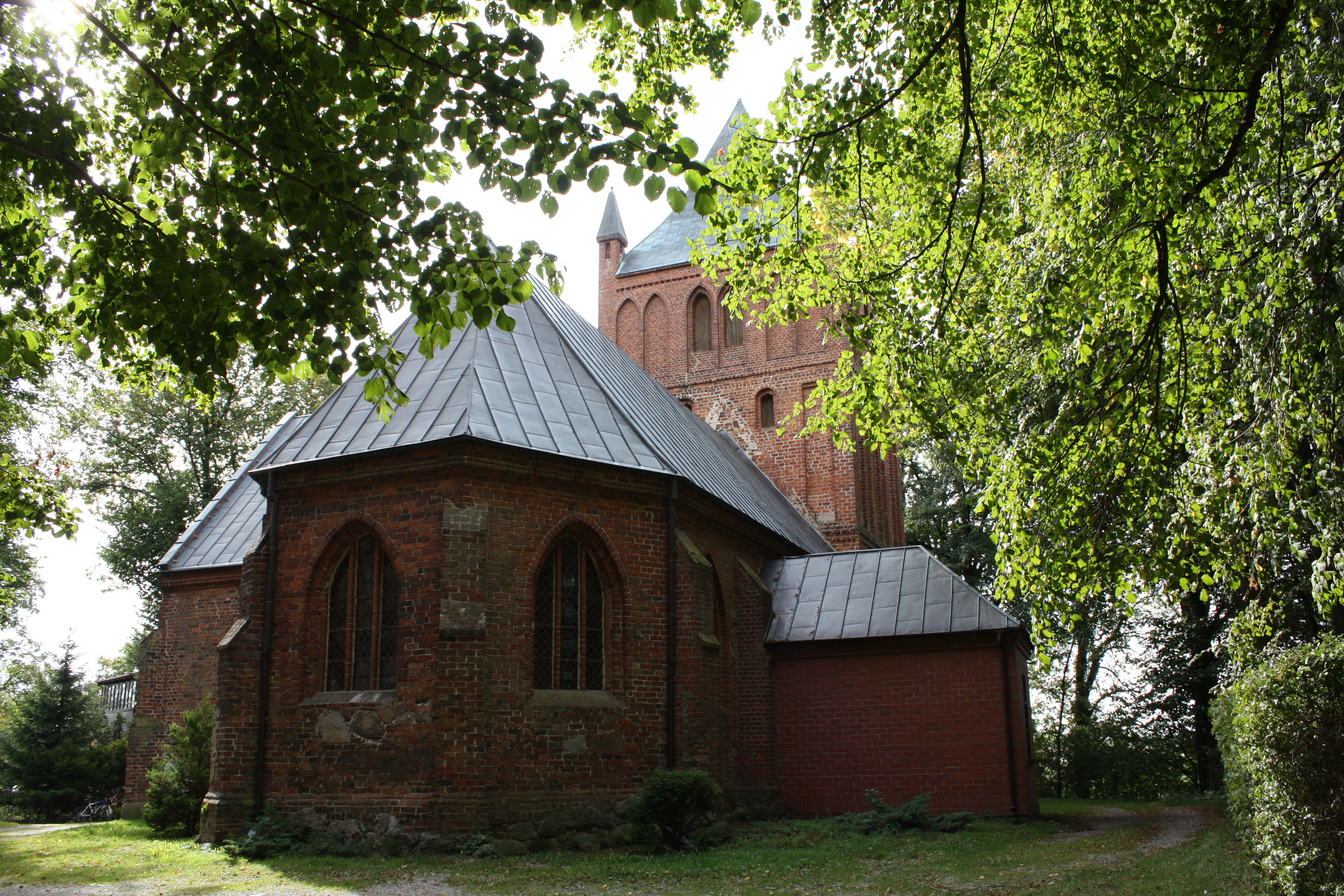 Łekno - kościół św. Jana Chrzciciela